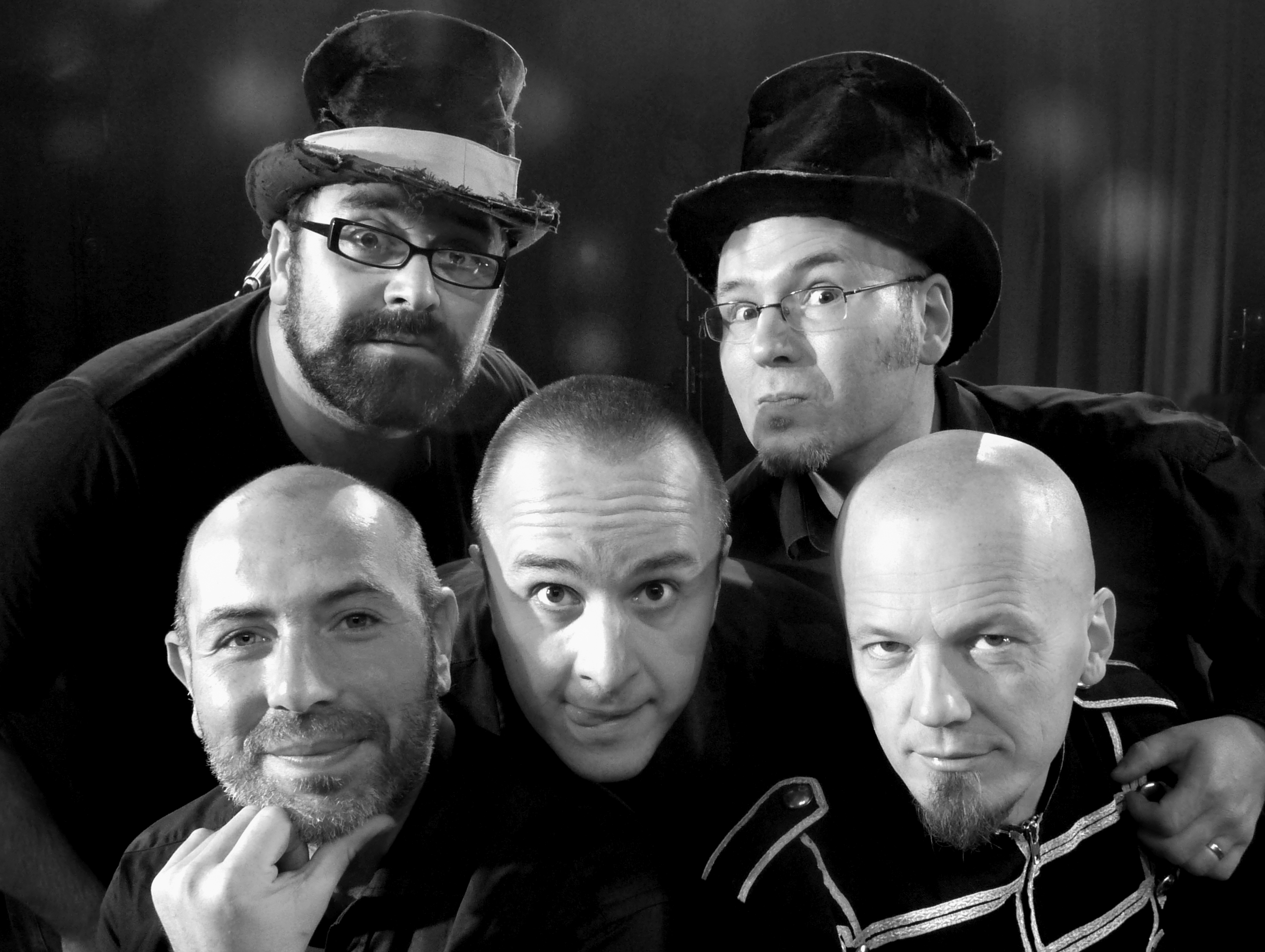 Weepers Circus en février 2013